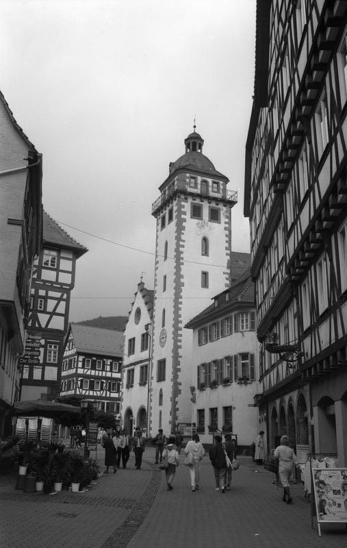 Juni 1988 Mosbach im Elztal